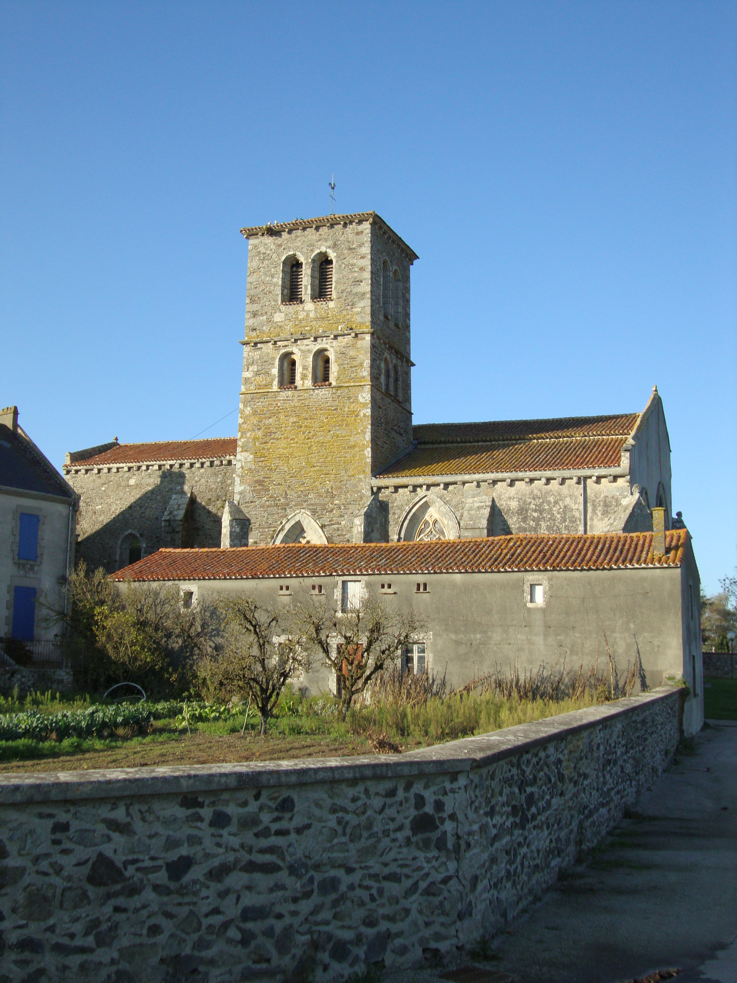 Église Notre-Dame-de-l'Assomption de Menomblet, (Inscrit, 1991) .